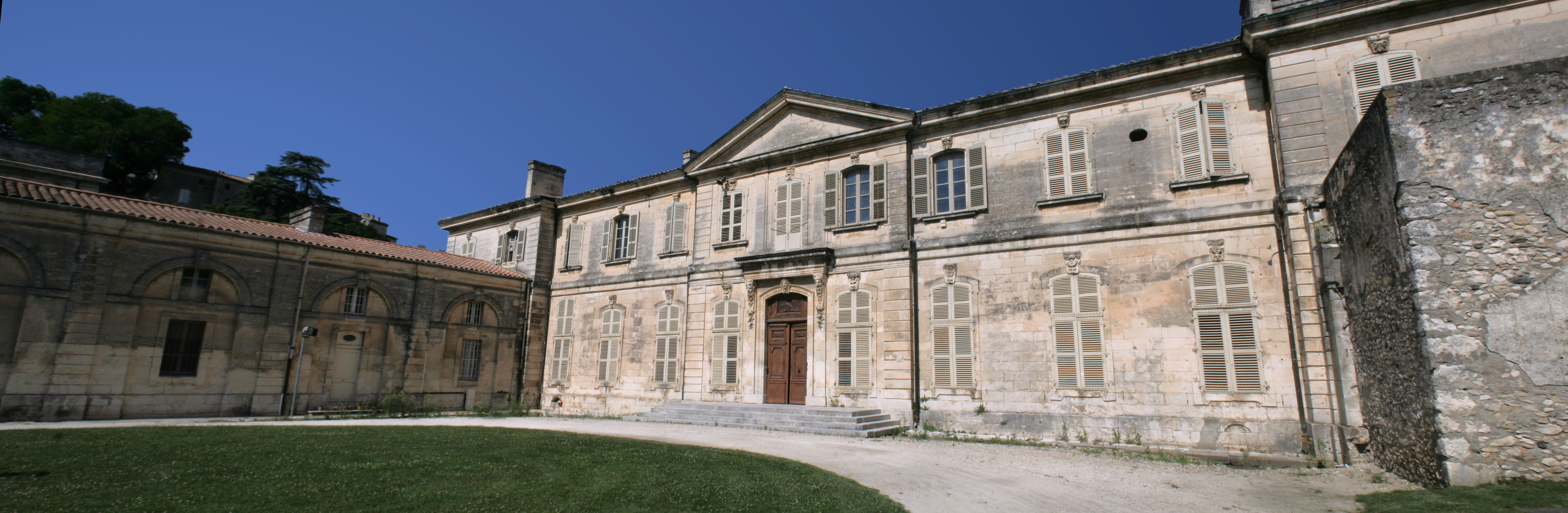 Das Rathaus der Stadt Viviers. Dieses Gebäude ist ein ehemaliger Bischofssitz, der durch den Architekten Jean-Baptiste Franque im Jahre 1737 entworfen wurde; zum monument historique klassifiziert durch Dekret vom 12. Juni 1989. Es hat einen schönen halbrunden Vorplatz. (Panorama aus drei Fotos mit hugin montiert, retuschiert mit gimp)